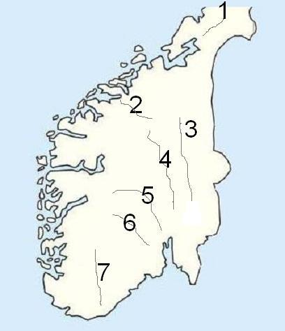 Enkelt kart over kjente norske daler. (oppdatert)